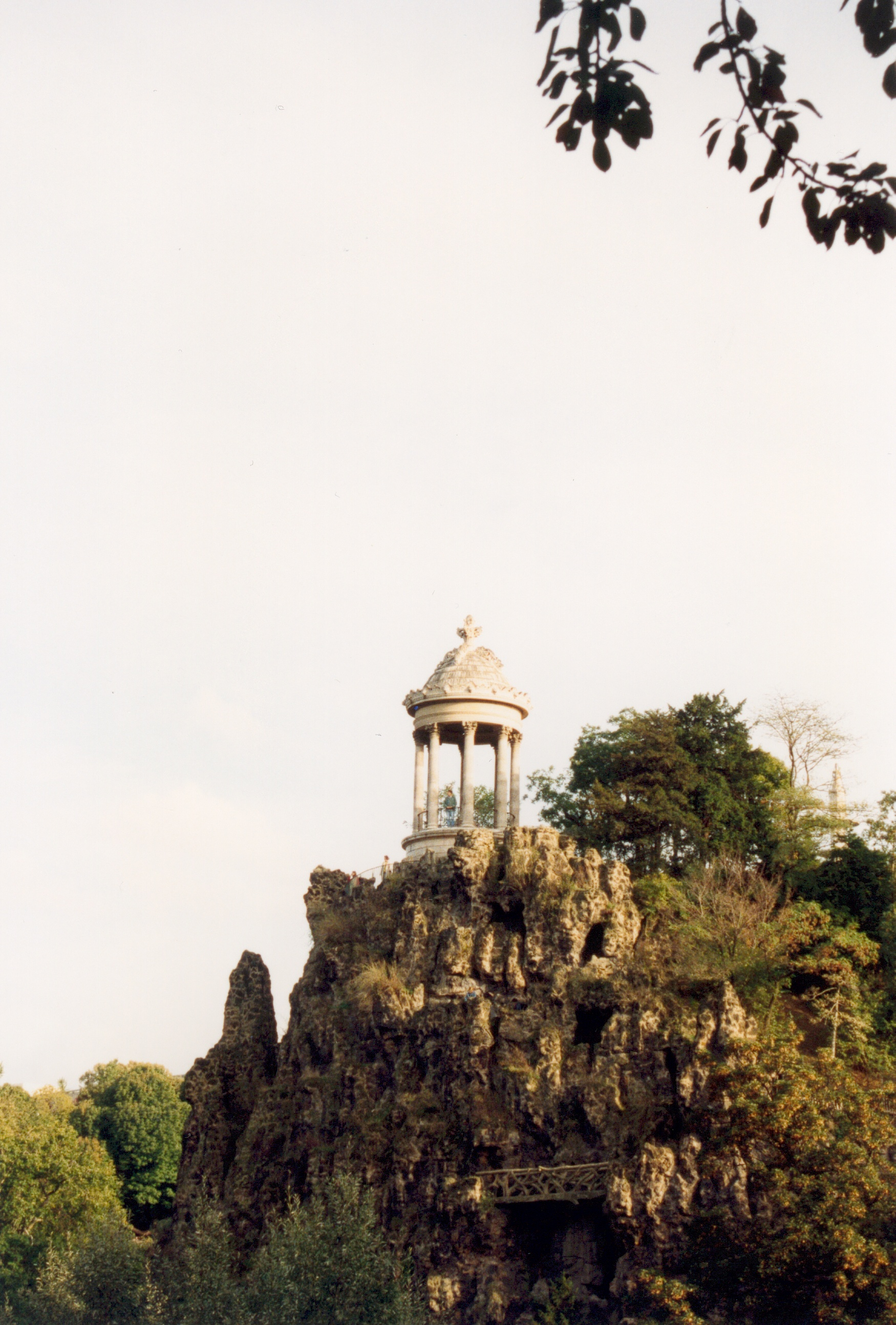 Paris France Le parc des Buttes-Chaumont